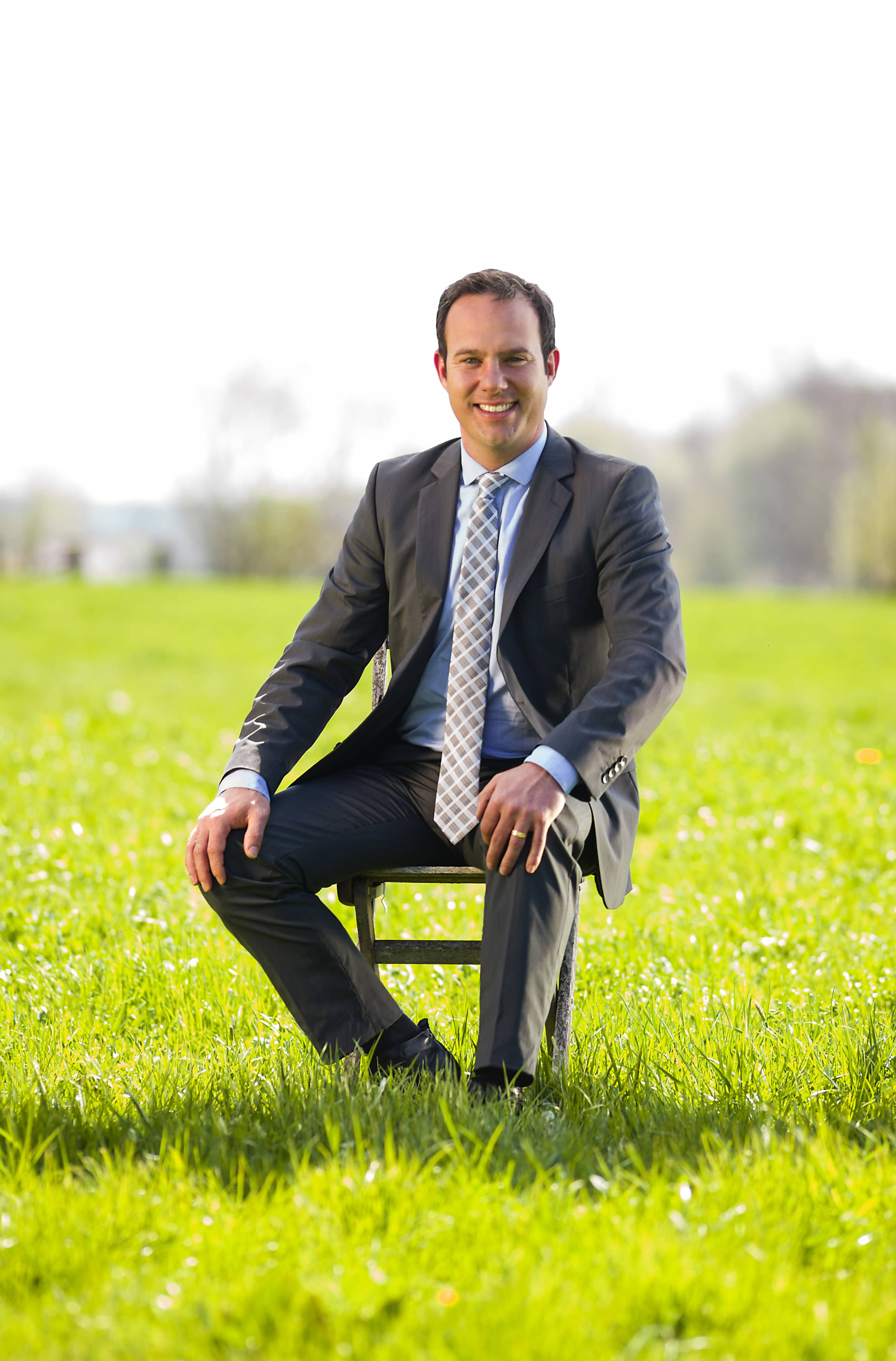 Raimund Haser in seinem Wahlkreis Wangen-Illertal.